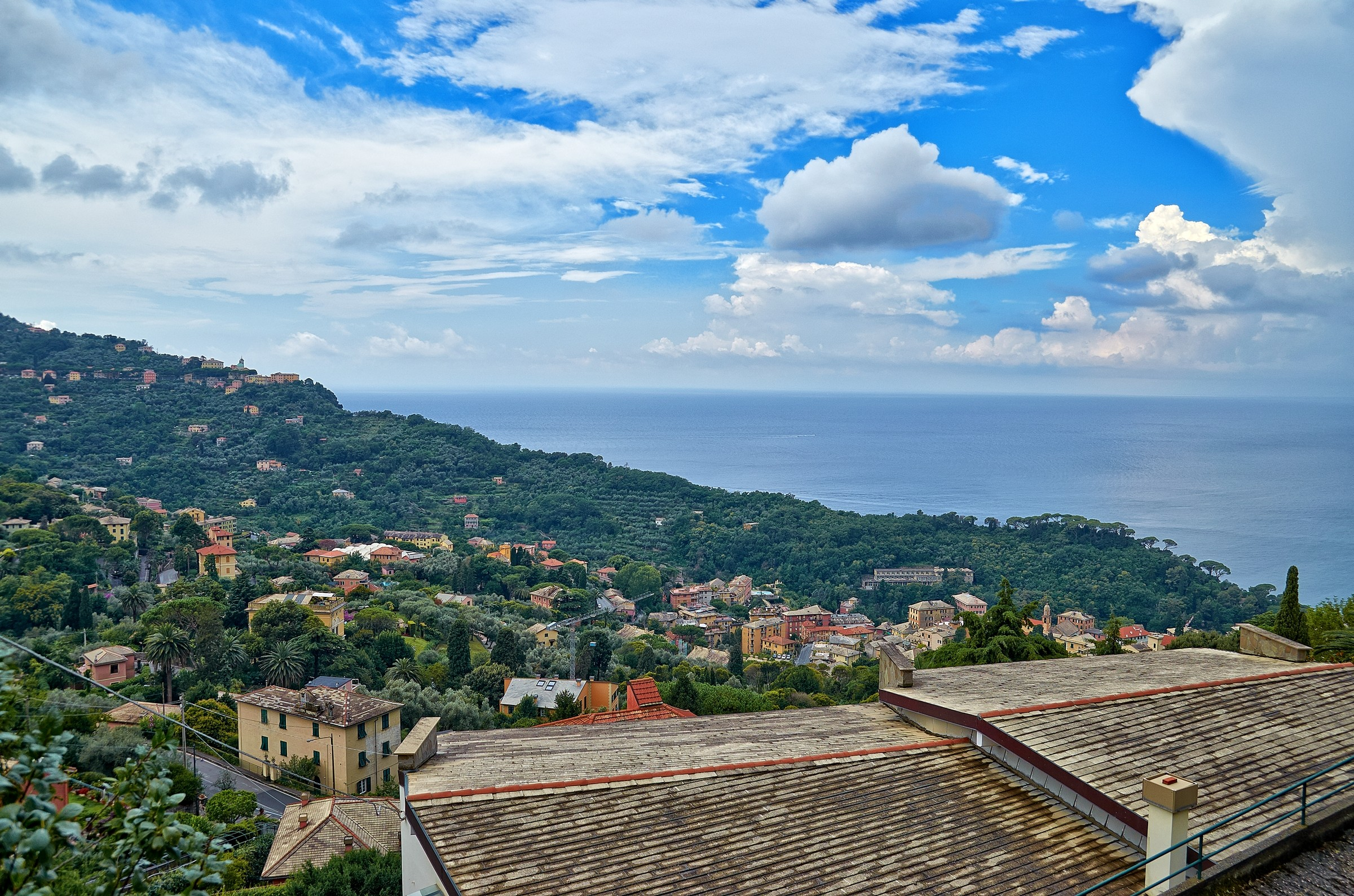 Alture di Camogli con San Rocco sullo sfondo